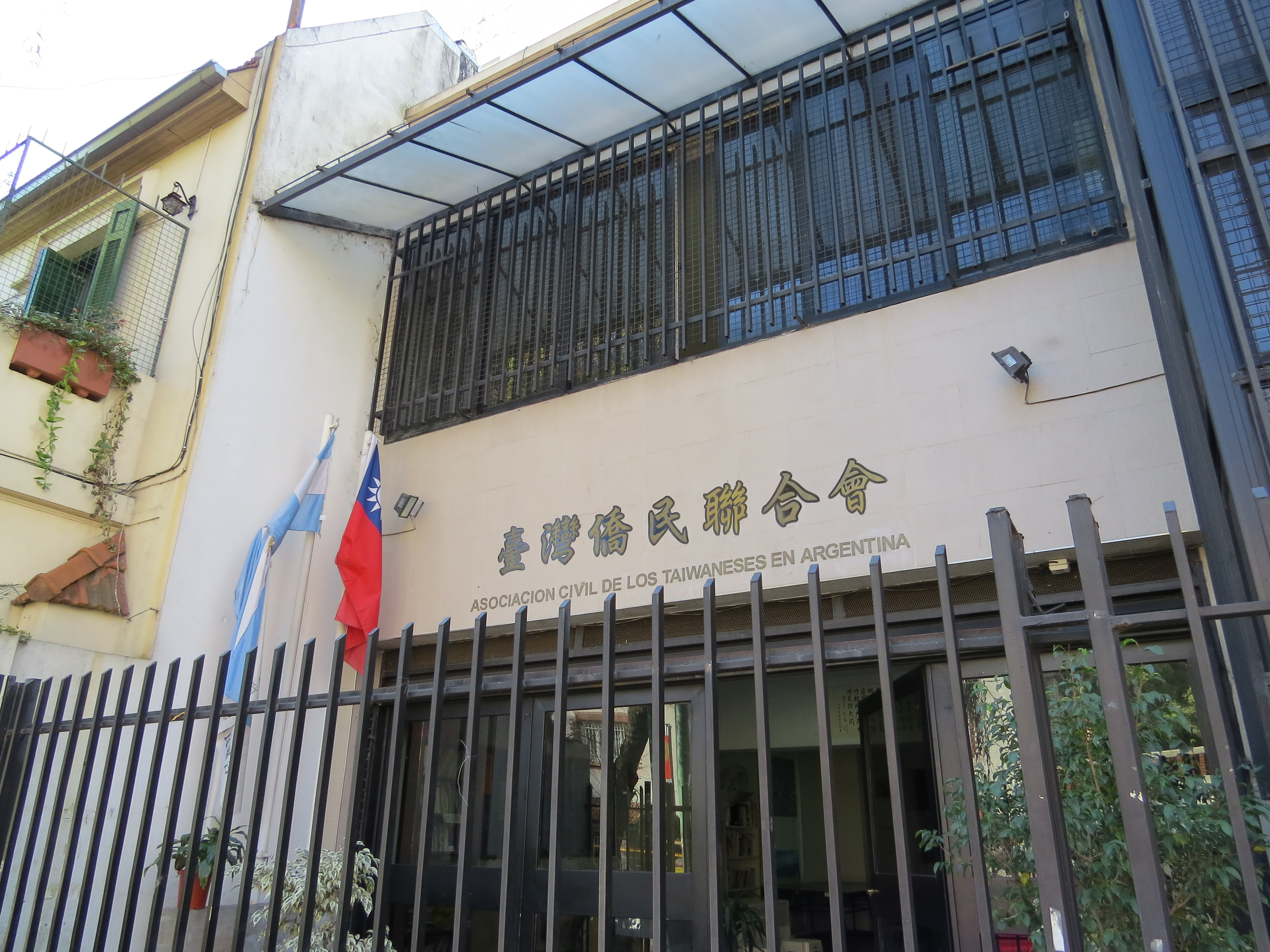 Chinatown, Belgrano, Buenos Aires